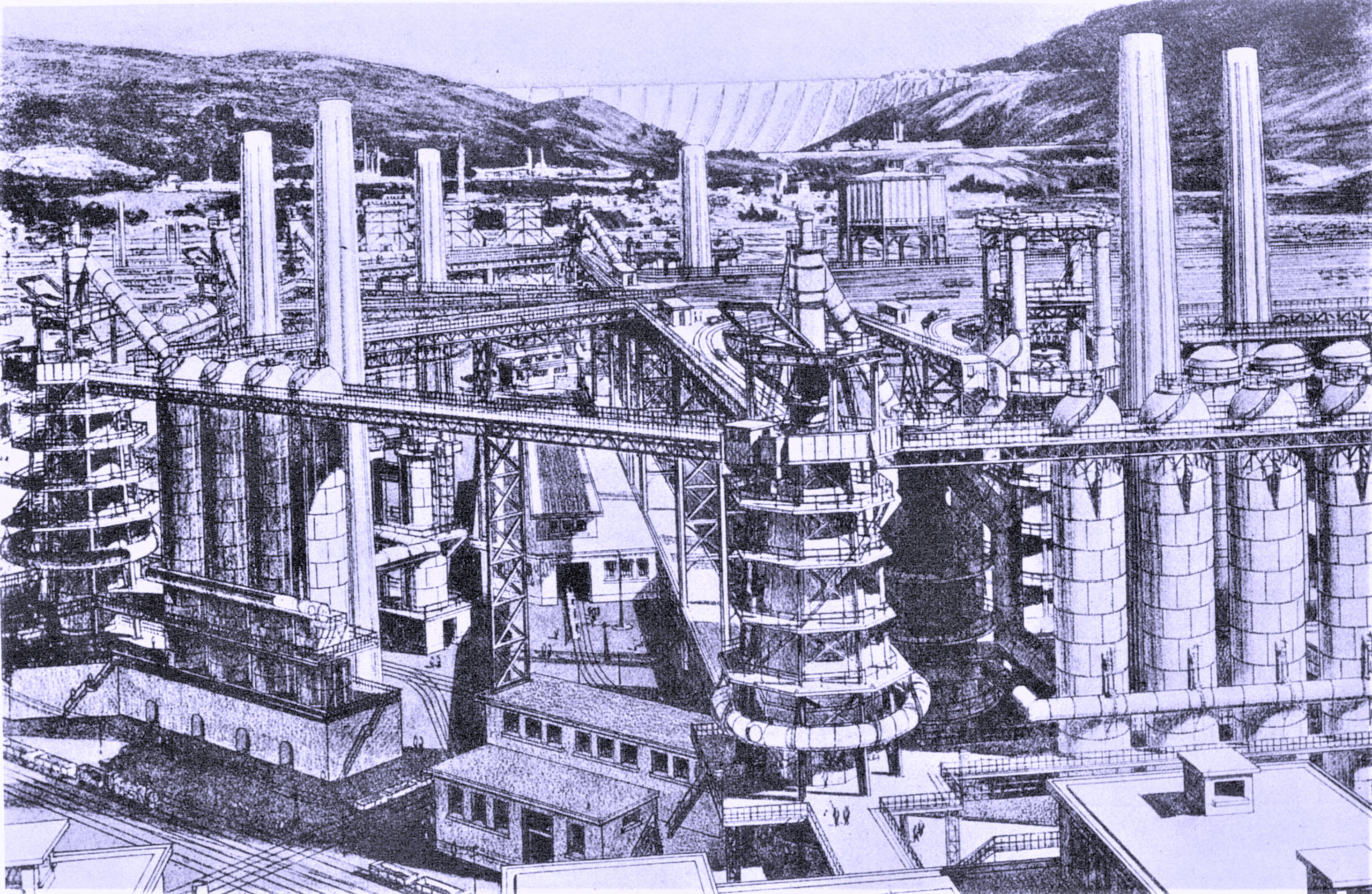 Tony Garnier, La cité industrielle (1901-1904), les hauts-fourneaux (image du domaine public modifiée)